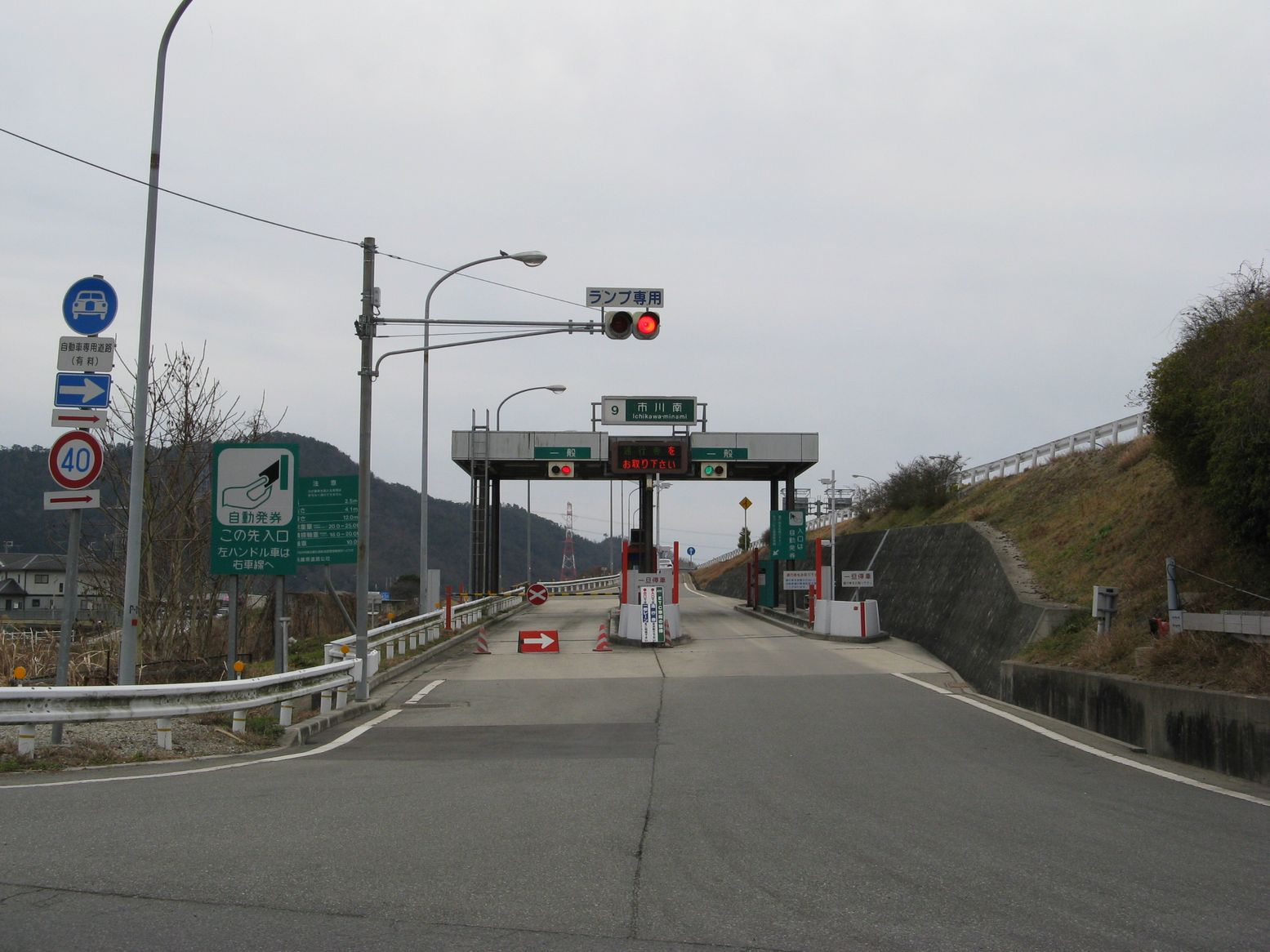 播但自動車道ja:市川南ランプ 姫路方面入口